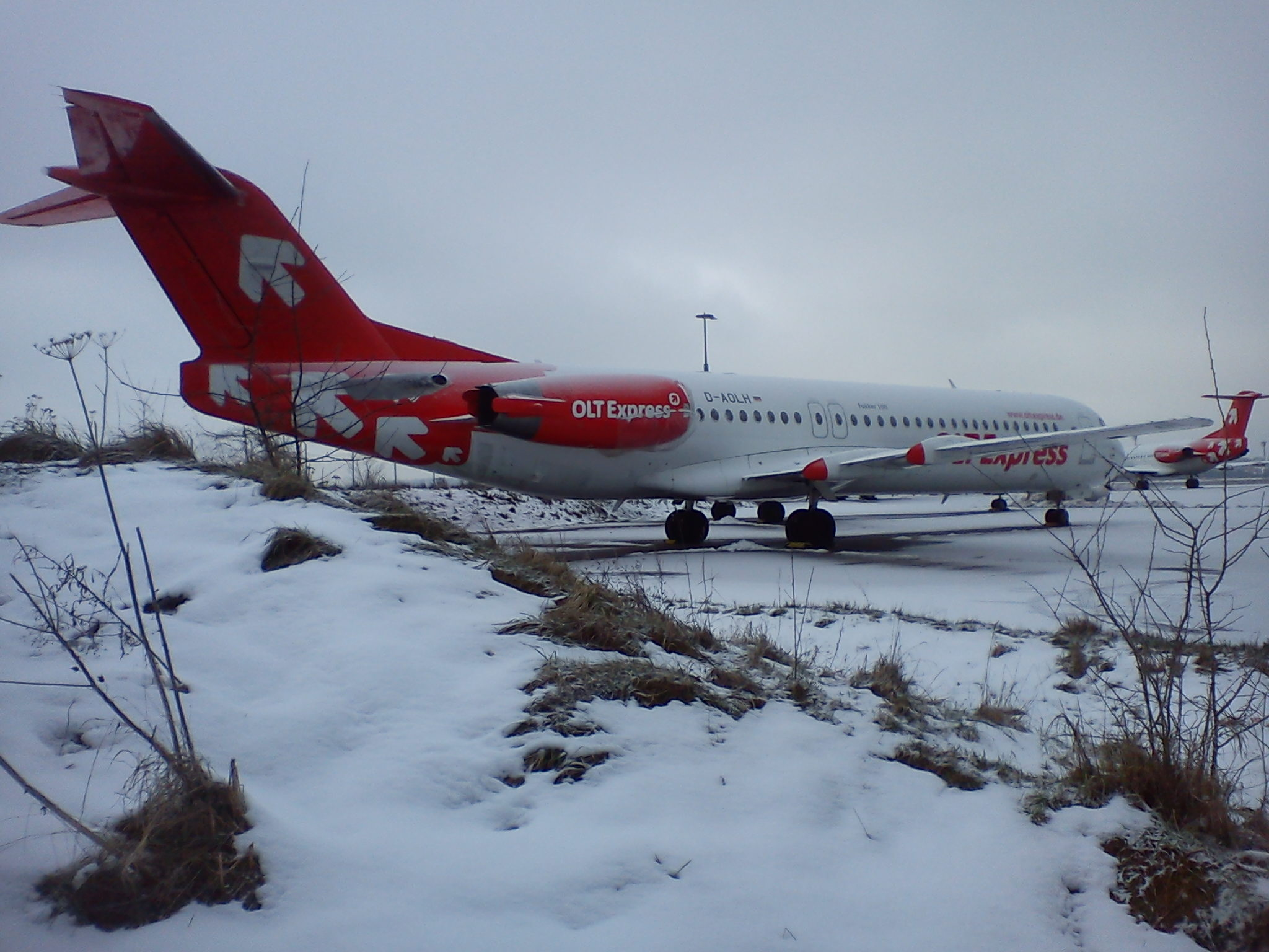 Nachdem OLT Express den Flugbetrieb am 23.1.2013 eingestellt hatte, wurden die Fokker 100 am Flughafen Saarbrücken stillgelegt.